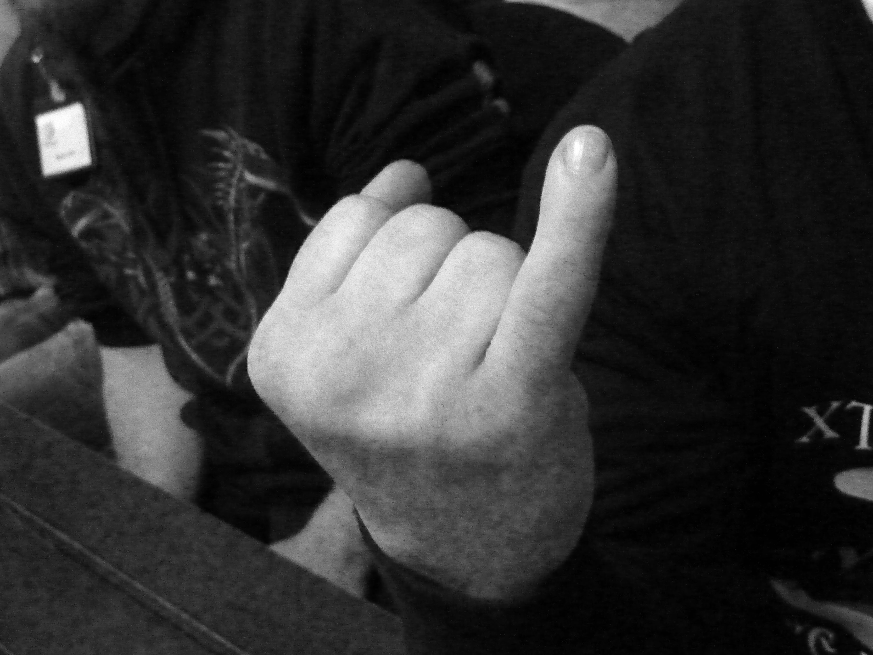 Klenkes von Der Expoteur